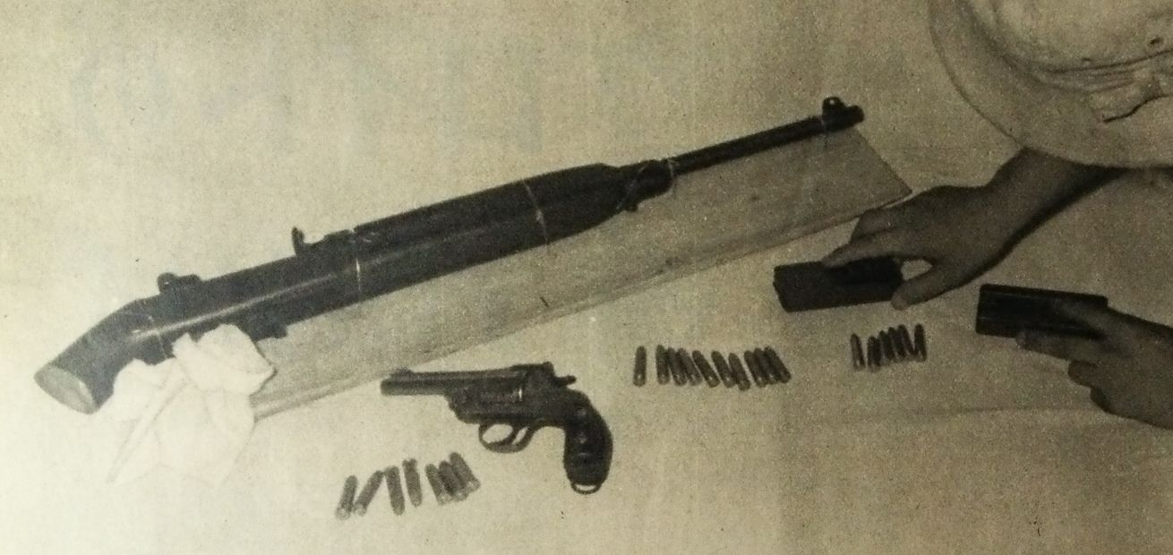 カービン銃ギャング事件の凶器